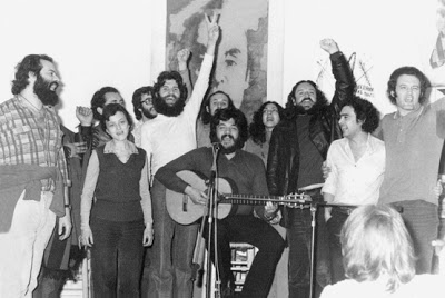 Homenaje a Pablo Neruda, celebrado en Buenos Aires en 1973. Llevado a cabo por el grupo Canto Popular Urbano (CPU), un movimiento de cantautores comprometidos. Entre ellos: Bichi-Bichi, María Teresa Corral, Picón Sánchez, Barba Mayo, Mario Alberto Costa, Martha Sigal, Poni Micharvegas, Osvaldo "Gitano" Rodríguez y Héctor Rivera.